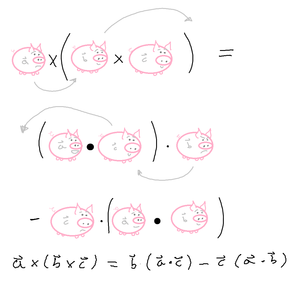 regla del chanchito para Doble producto vectorial